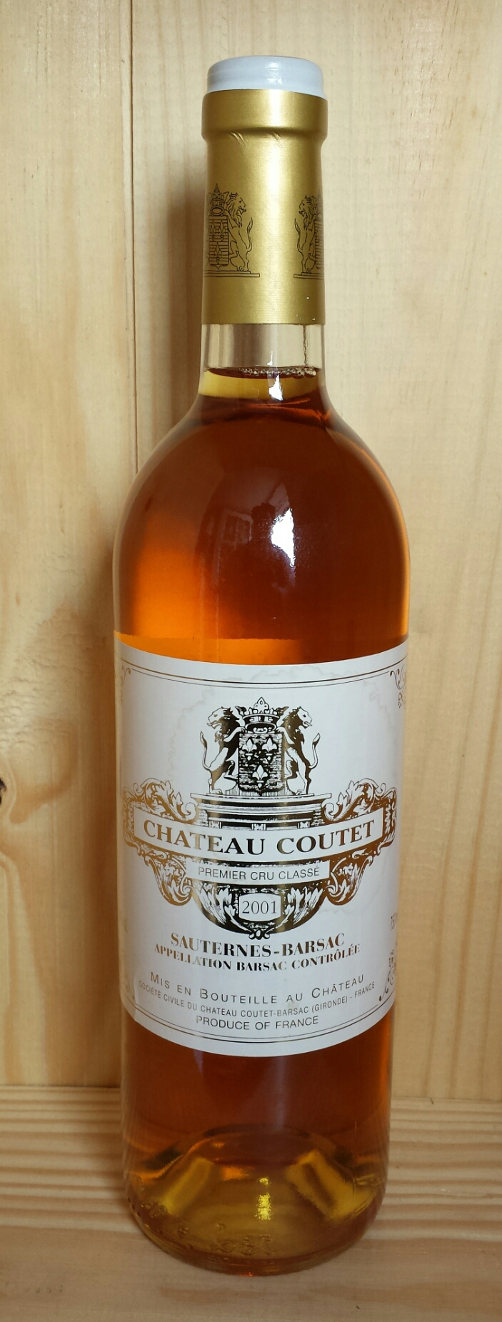 Une bouteille de Château Coutet millésime 2001 (AOC Sauternes-Barsac)